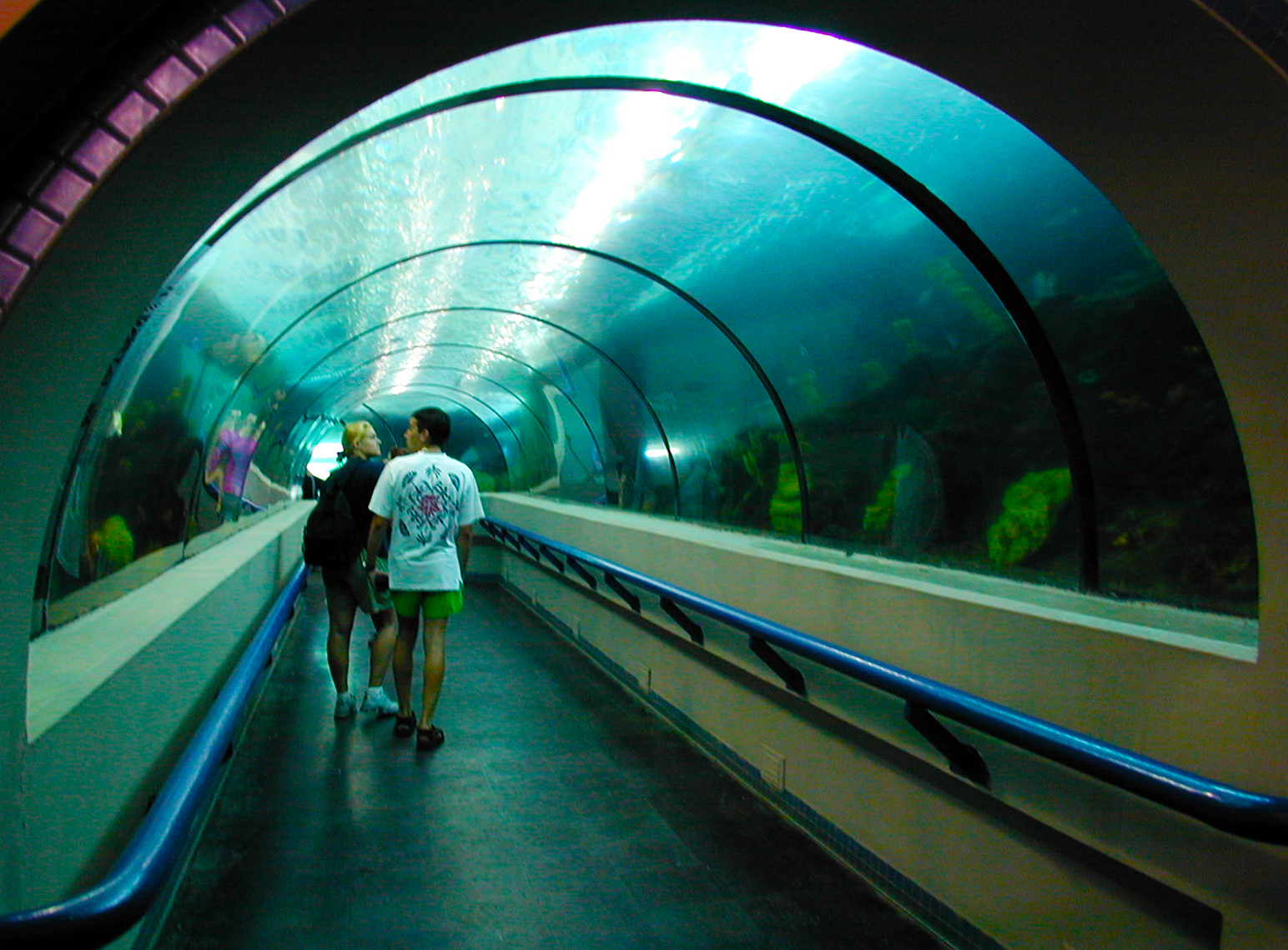 Acuario Nacional